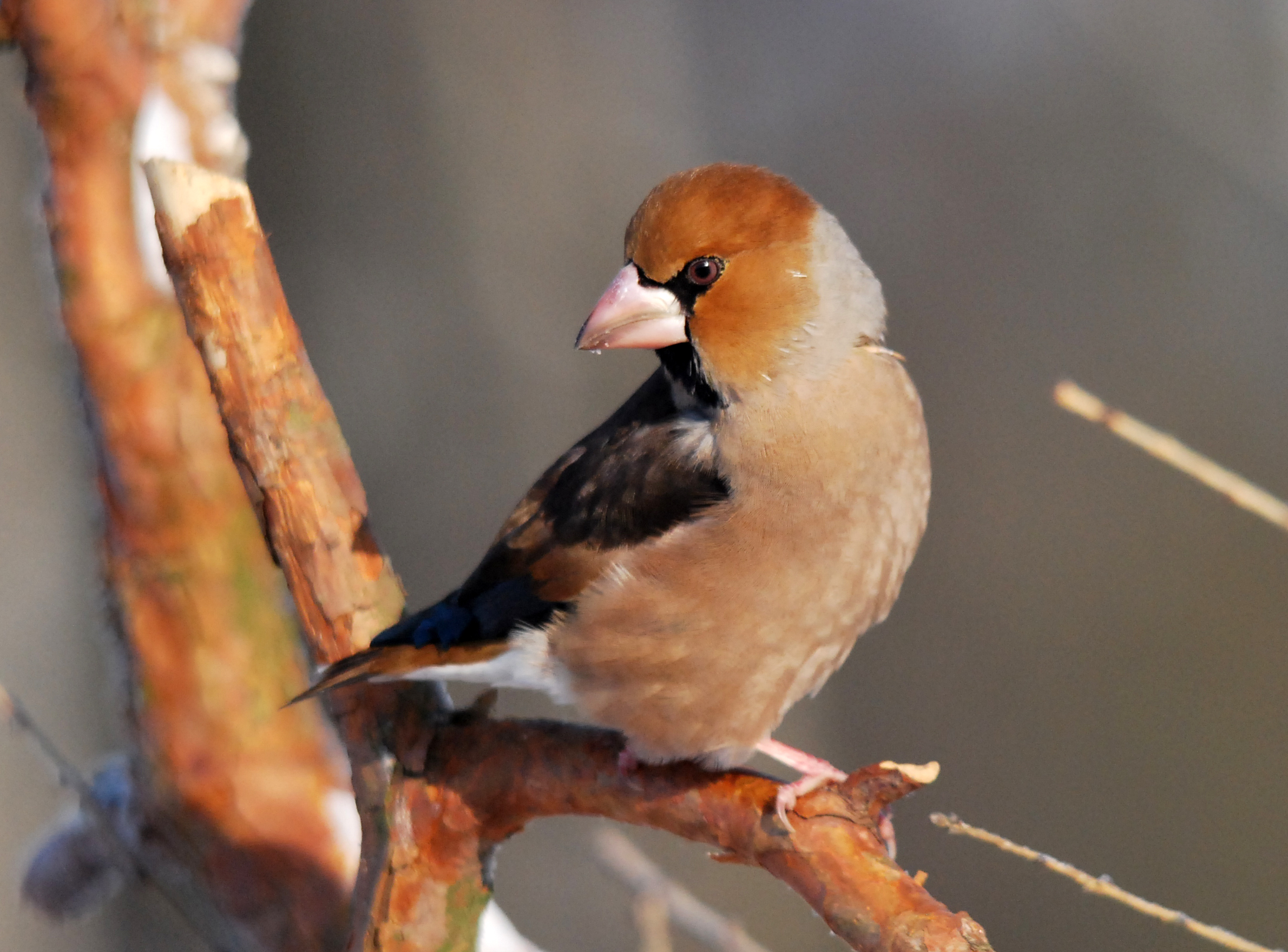 Grubodziób zwyczajny